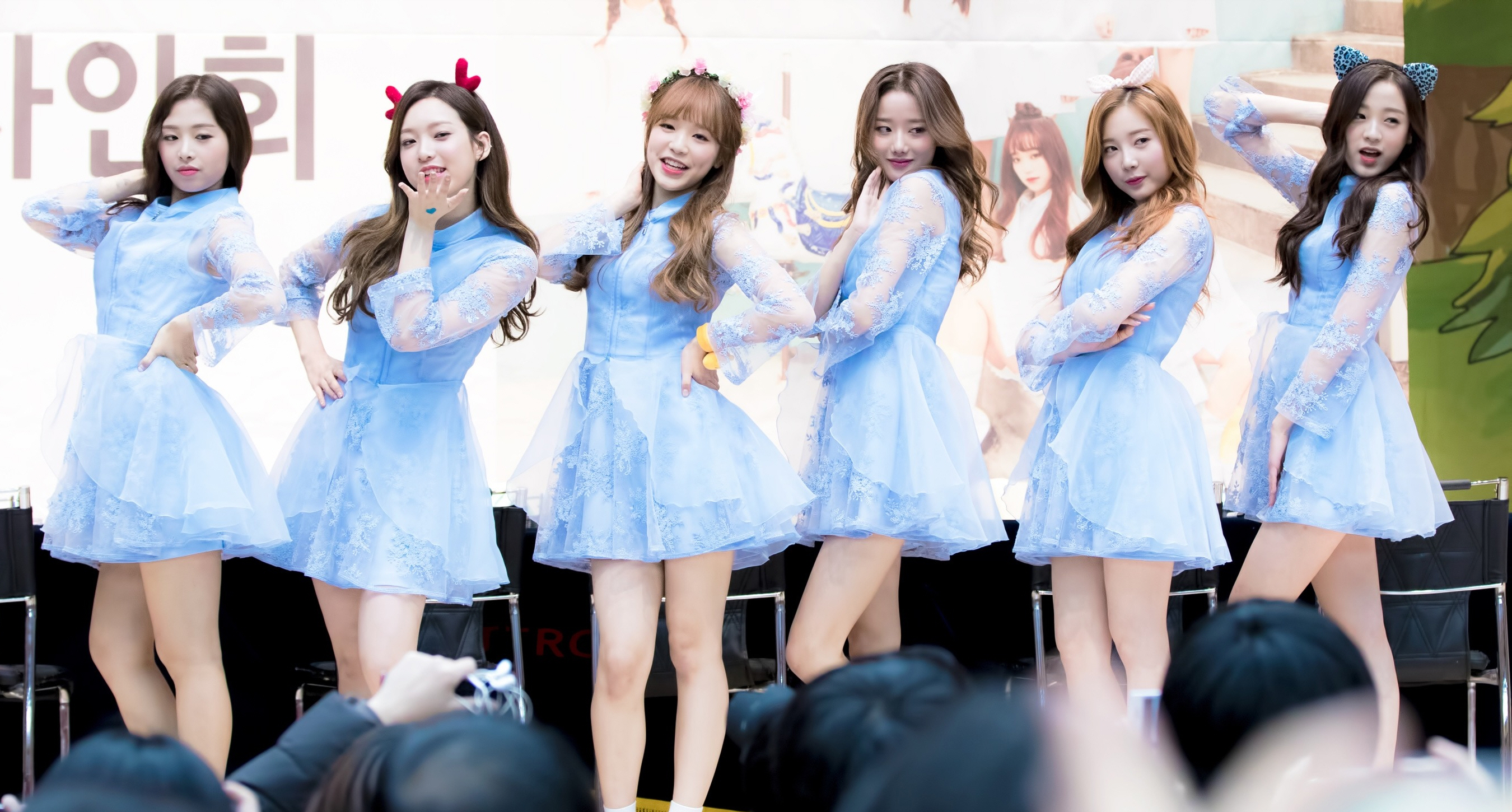 170115 목동 APRIL 팬싸인회 에이프릴 2Pic